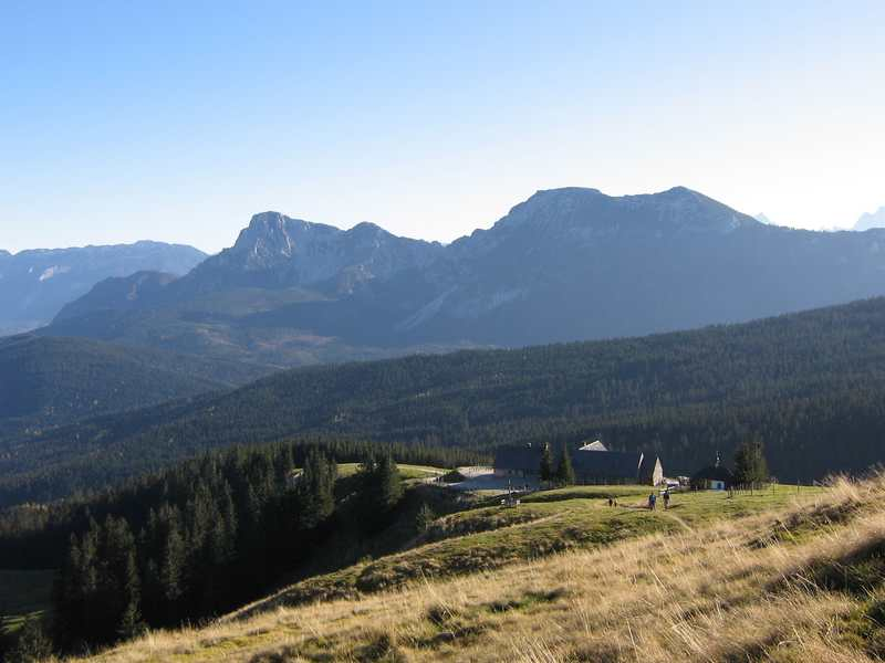 Von der Schneid hinab zur Stoißer Alm fotografiert. Im Hintergrund von links nach rechts Untersberg, Hochstaufen und Zwiesel.